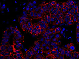 IF - HER2